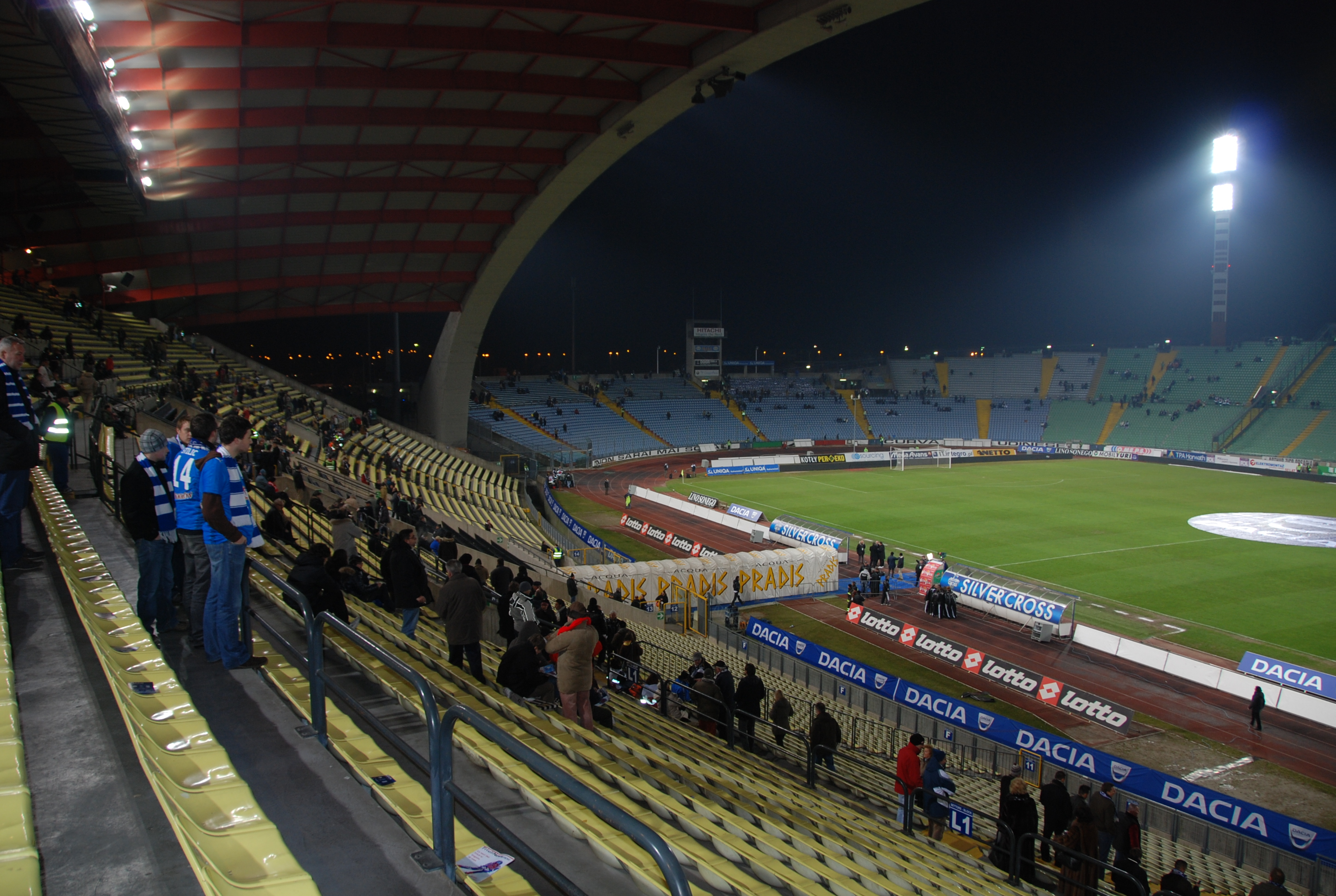 Stadio Friuli, Udine